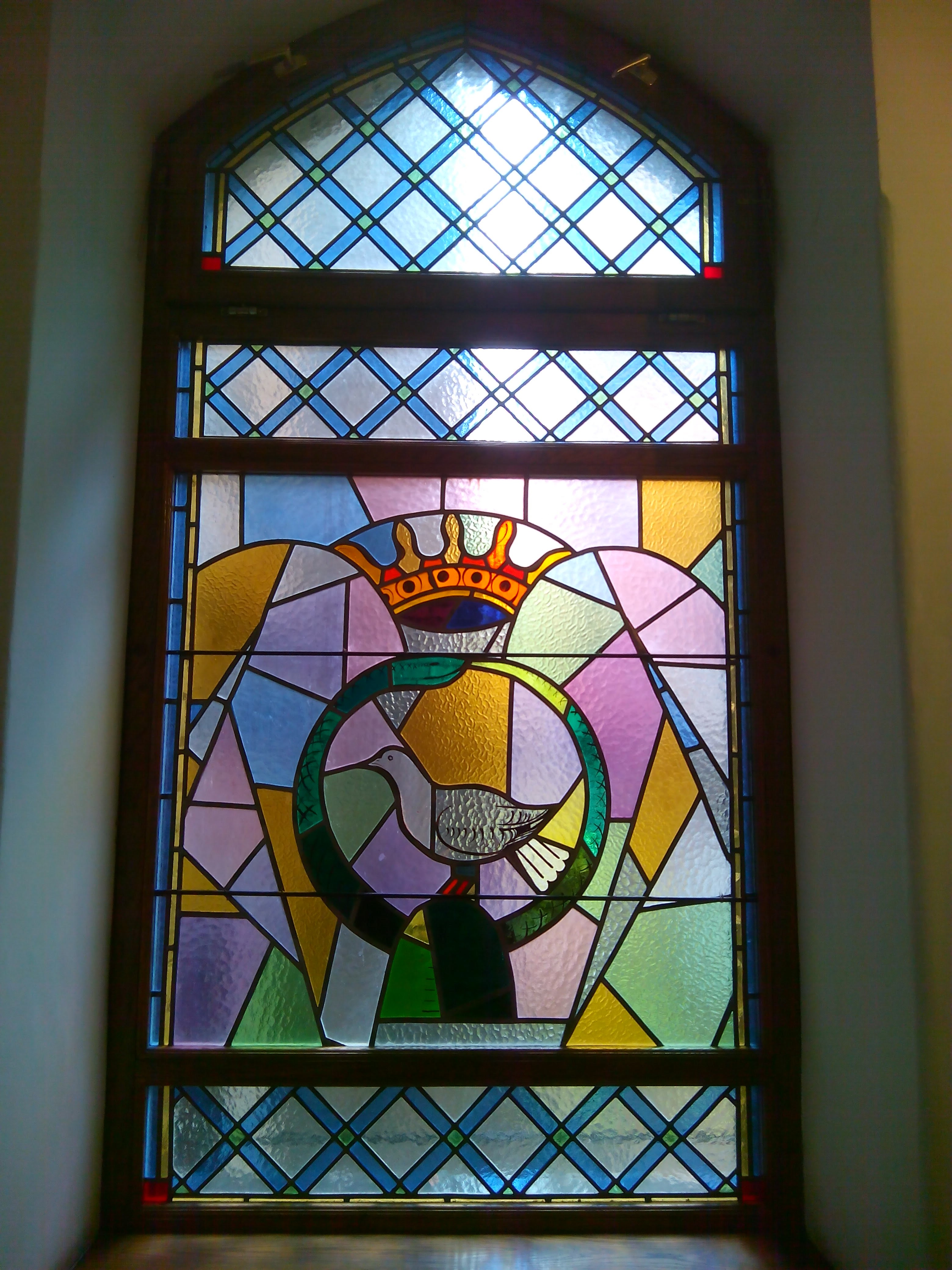 Budapest unitárius templom üvegablak